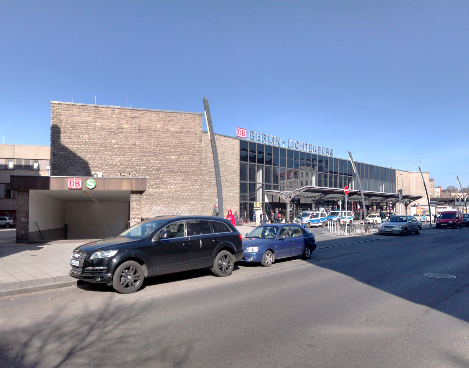 Bahnhof Berlin-Lichtenberg Eingangsgebäude, Weitlingstraße